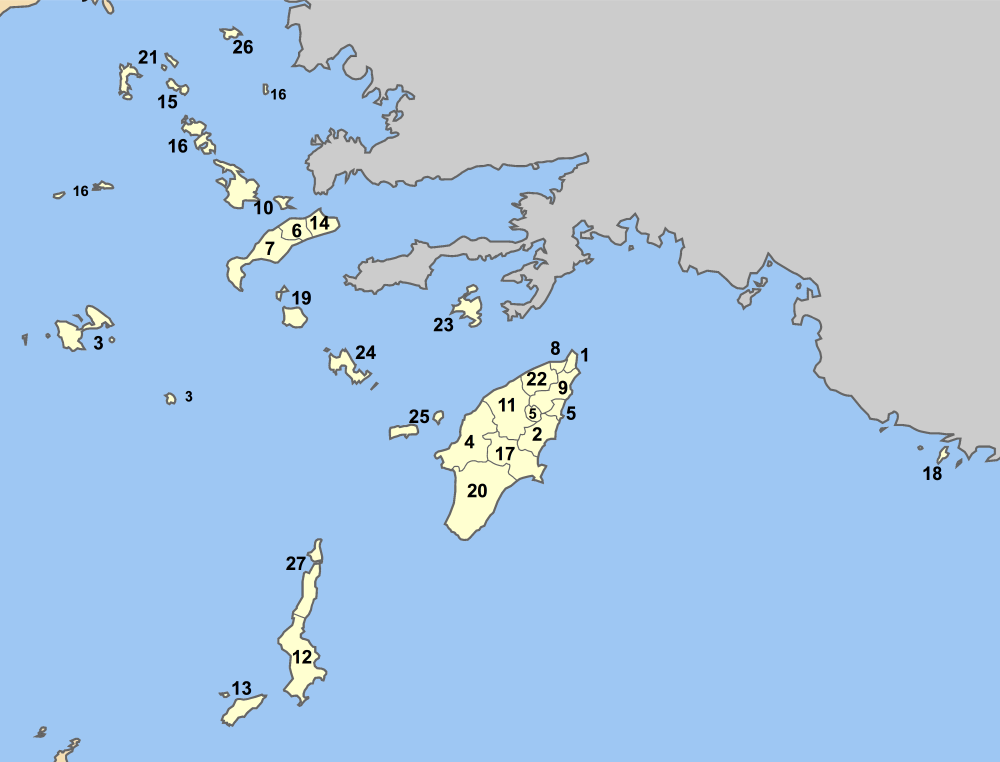 Map of Dodecanese prefecture (Greece) with administrative divisions (municipalities and communities) numbered in alphabetical order (in greek). Legend: 1 Δήμος Ρόδου - Rhodos 2 Δήμος Αρχαγγέλου - Archangelos Rodou 3 Δήμος Αστυπάλαιας - Astypalea 4 Δήμος Αταβύρου - Atavyros 5 Δήμος Αφάντου - Afandou 6 Δήμος Δικαίου - Dikeos 7 Δήμος Ηρακλειδών - Iraklides 8 Δήμος Ιαλυσού - Ialysos 9 Δήμος Καλλιθέας - η Καλλιθέα - Kallithea Rodou 10 Δήμος Καλυμνίων - Kalymnos 11 Δήμος Καμείρου - Kamiros 12 Δήμος Καρπάθου - Karpathos 13 Δήμος Κάσου - Kasos 14 Δήμος Κω - Kos 15 Δήμος Λειψών - Lipsi 16 Δήμος Λέρου - Leros 17 Δήμος Λινδίων - Lindos 18 Δήμος Μεγίστης - Megisti Kastelorizo 19 Δήμος Νισύρου - Nisyros 20 Δήμος Νότιας Ρόδου - Notia Rodos 21 Δήμος Πάτμου - Patmos 22 Δήμος Πεταλούδων - Petaloudes 23 Δήμος Σύμης - Symi 24 Δήμος Τήλου - Tilos 25 Δήμος Χάλκης - Chalki 26 Κοινότητα Αγαθονησίου - Agathonisi 27 Κοινότητα Ολύμπου - Olymbos